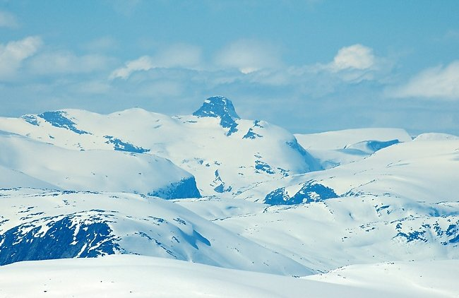 Lodalskåpa (nunatak on Jostedalsbreen) seen from Fannaråki